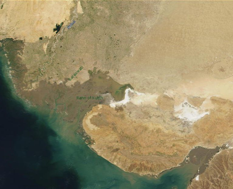 Solniska Rann of Kutch na granicy indyjskiego stanu Gudźarat z Pakistanem. Zaznaczono rzekę Indus i przybliżone położenie wyschniętej rzeki Saraswati